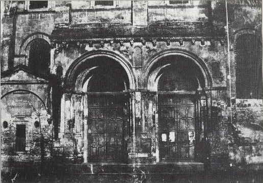 Calotype_de 1855_présentant la porte de la basilique st Sernain et l'enfeu_du comte Guillaume III de Toulouse( Taillefer).